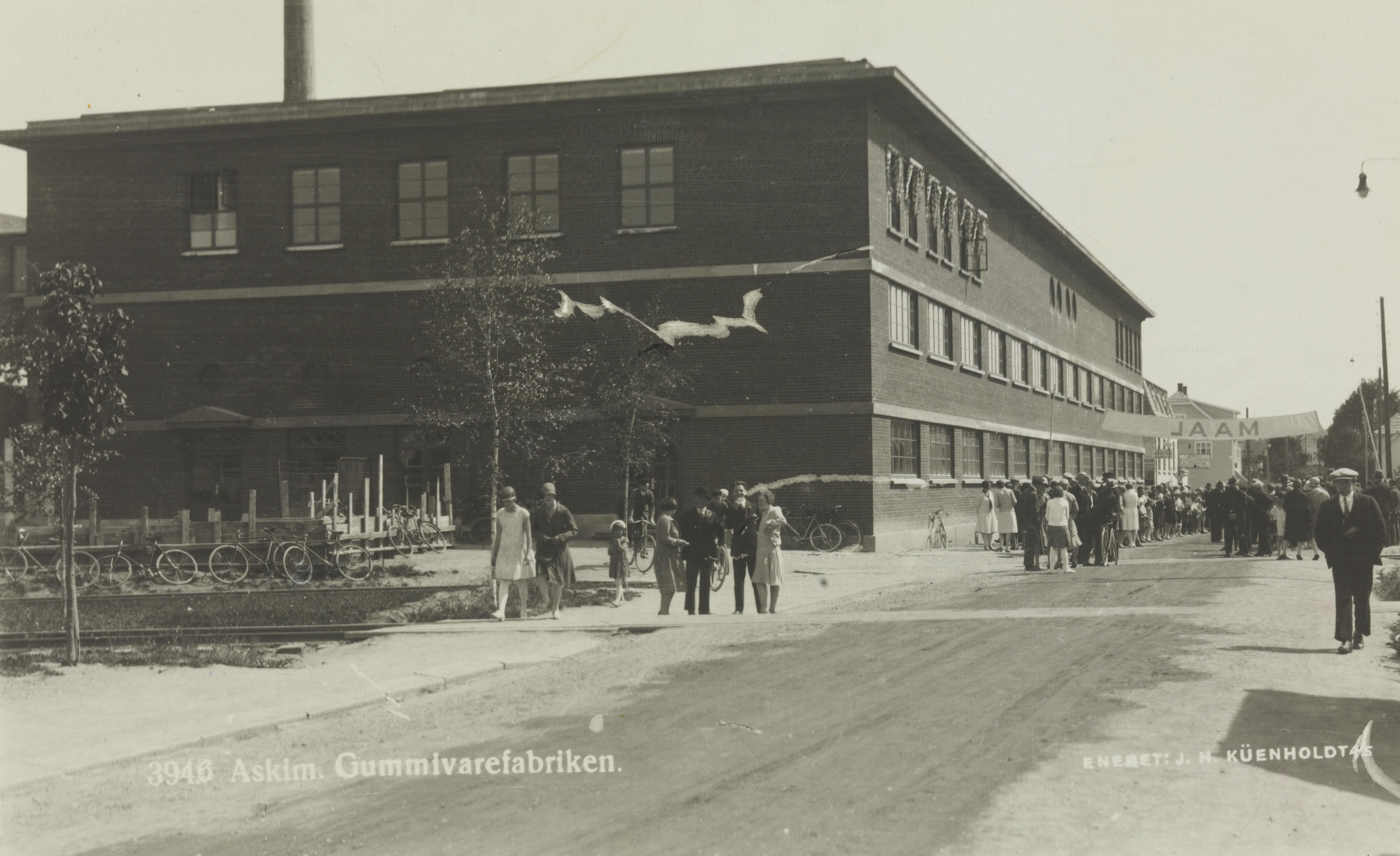 Bildet er hentet fra Nasjonalbibliotekets bildesamling